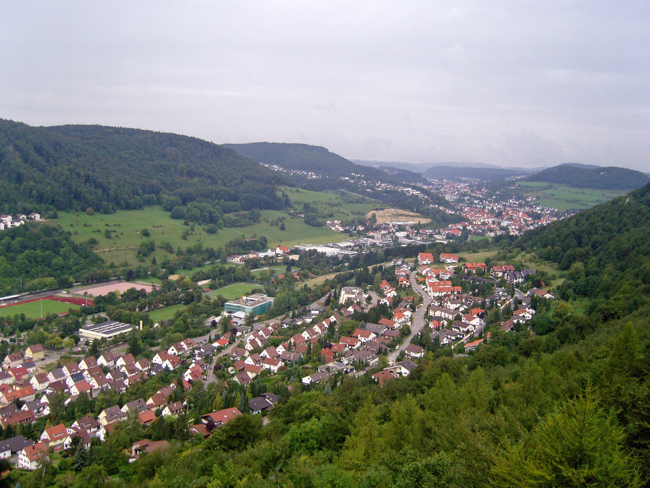 Talgang von Ebingen Richtung Onstmettingen